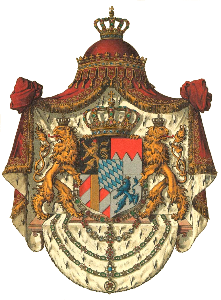 Mittleres Wappen